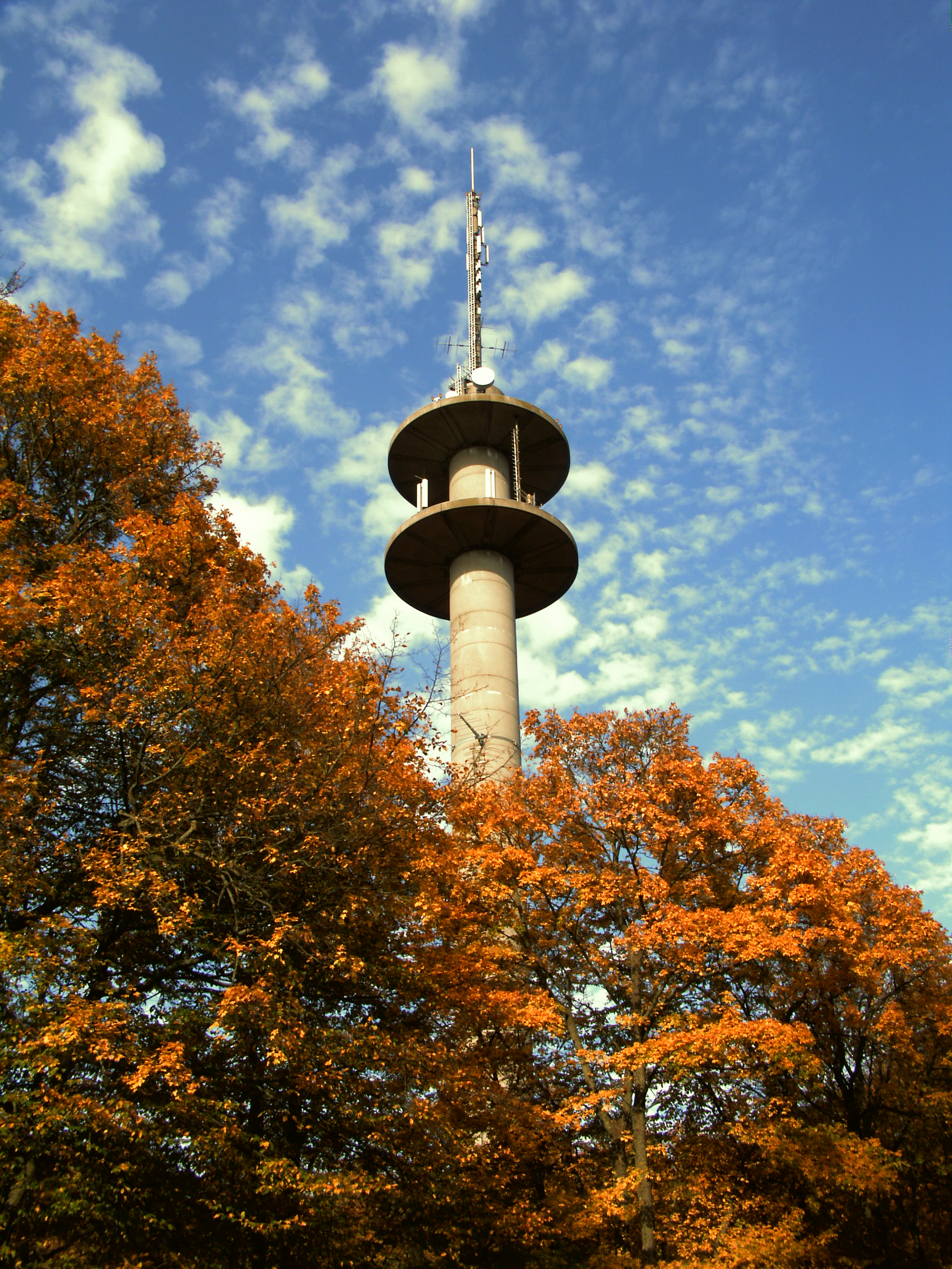 Wolfsburg, Turm auf dem Klieversberg